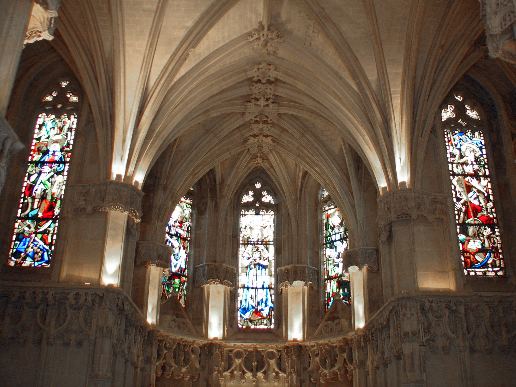 Decoration inside Saint-Hubert Chapel, Château d'Amboise, France